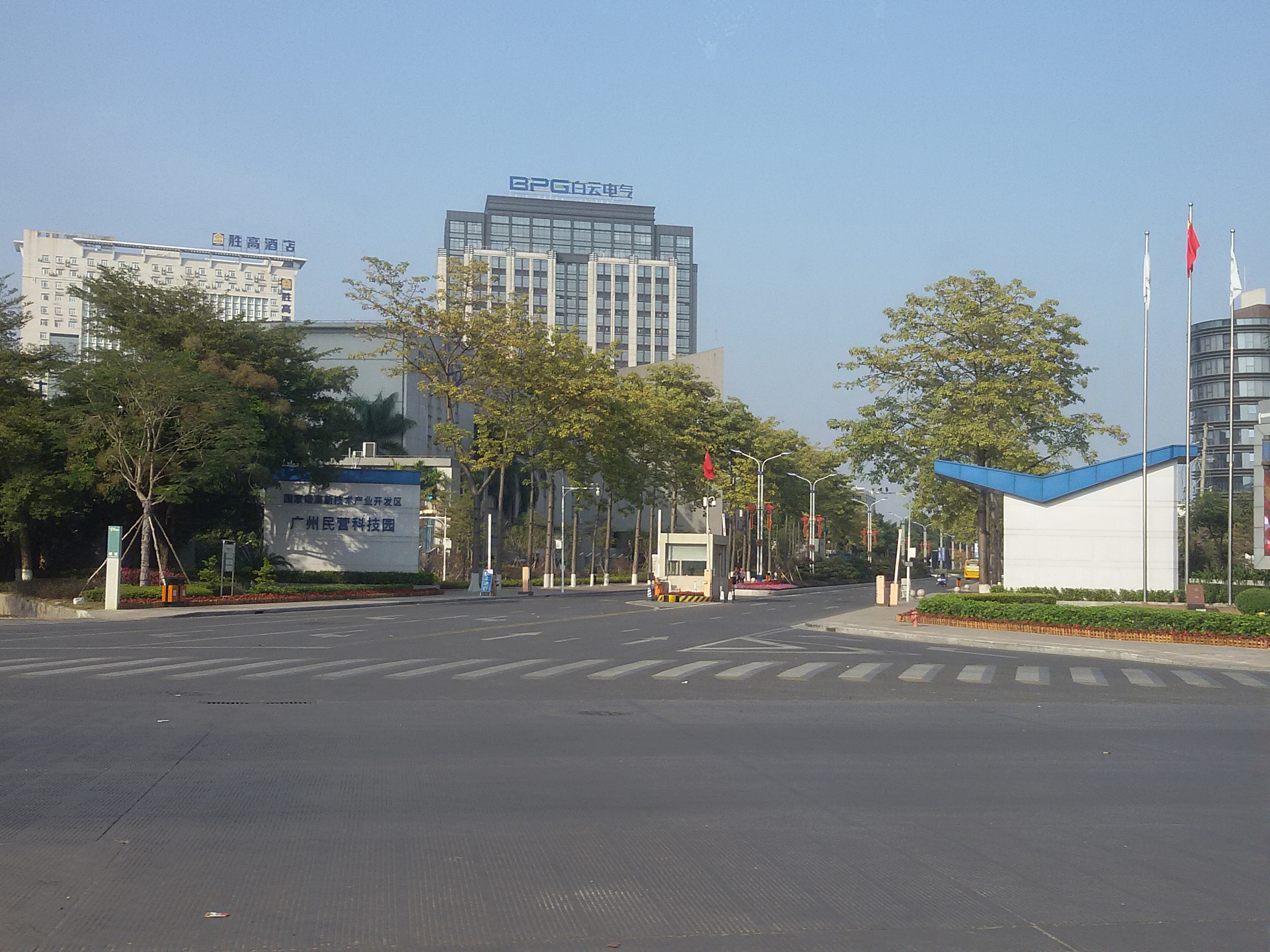 粵語: 广州民营科技园